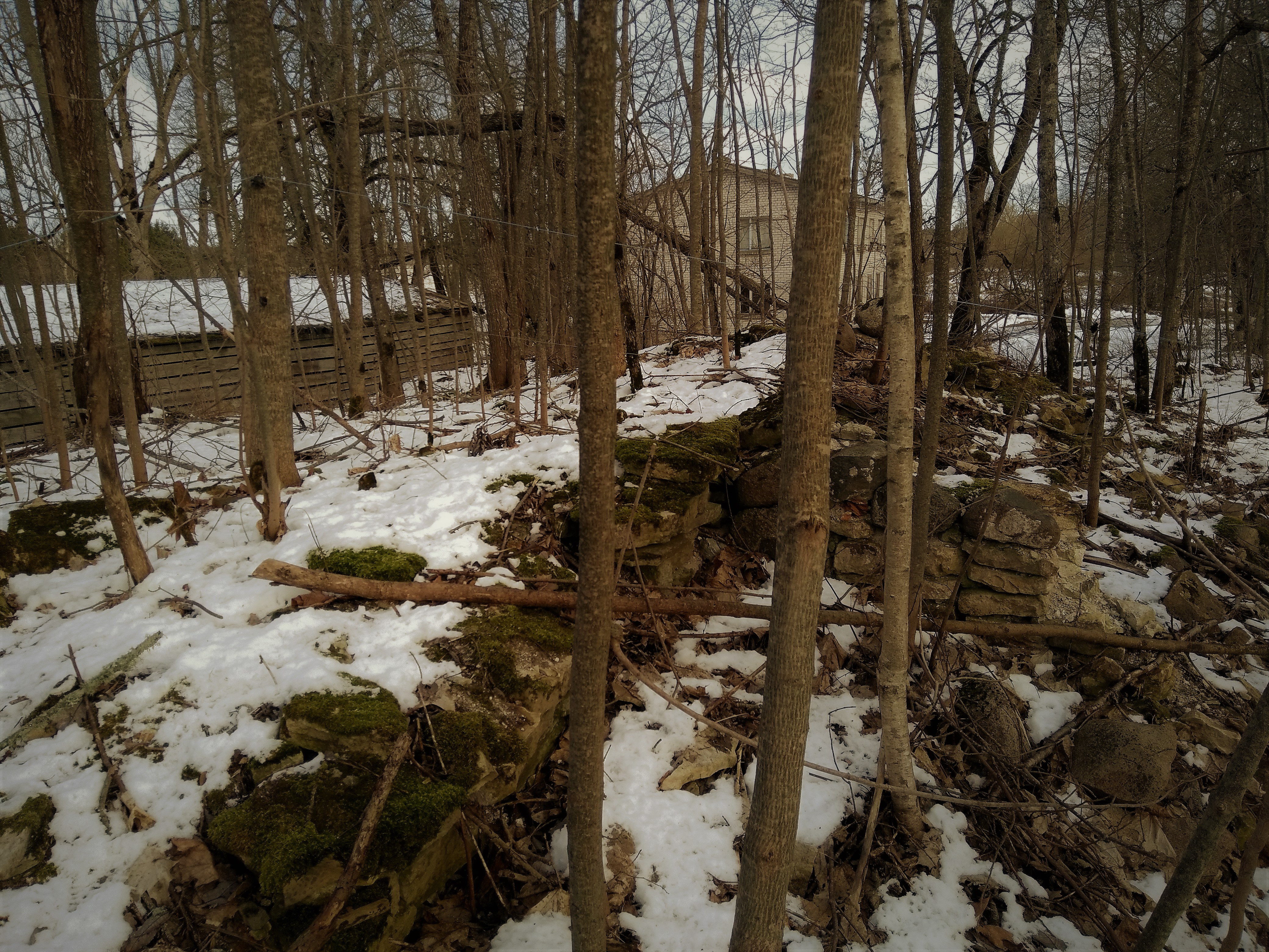 Vaade Paadremaa mõisa peahoone soklikorruse keskel jooksvale paksule müürile. Vaade kagusse. Sookalda küla